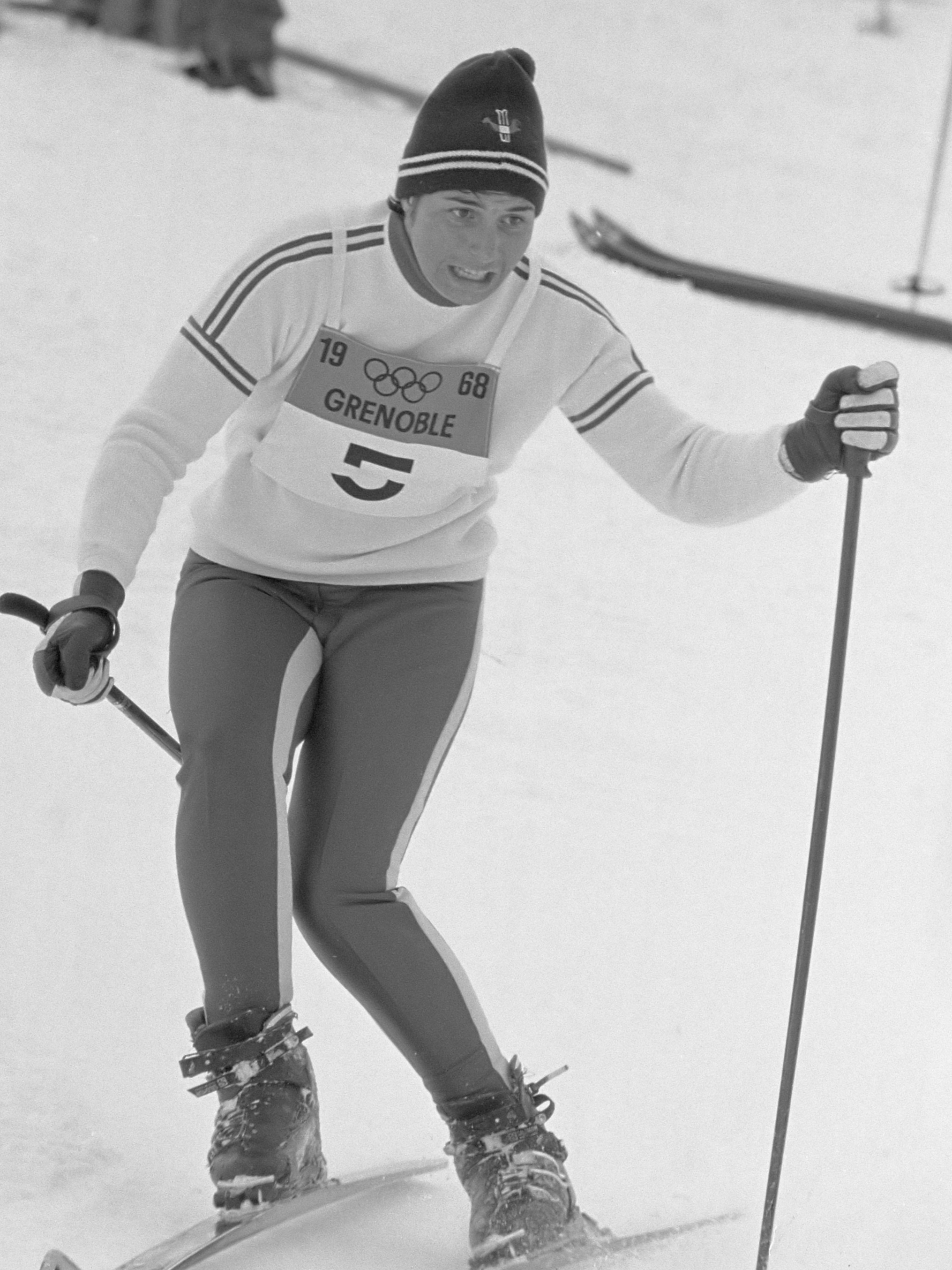 Olympische Spelen Grenoble, ski-slalom dames, Marielle Goitschel (Frankrijk) in aktie, wint goud 13 februari 1968